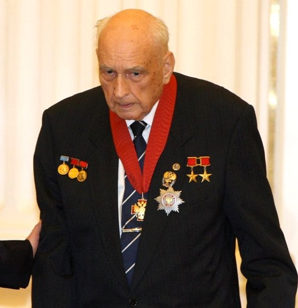 Сергей Ковалев